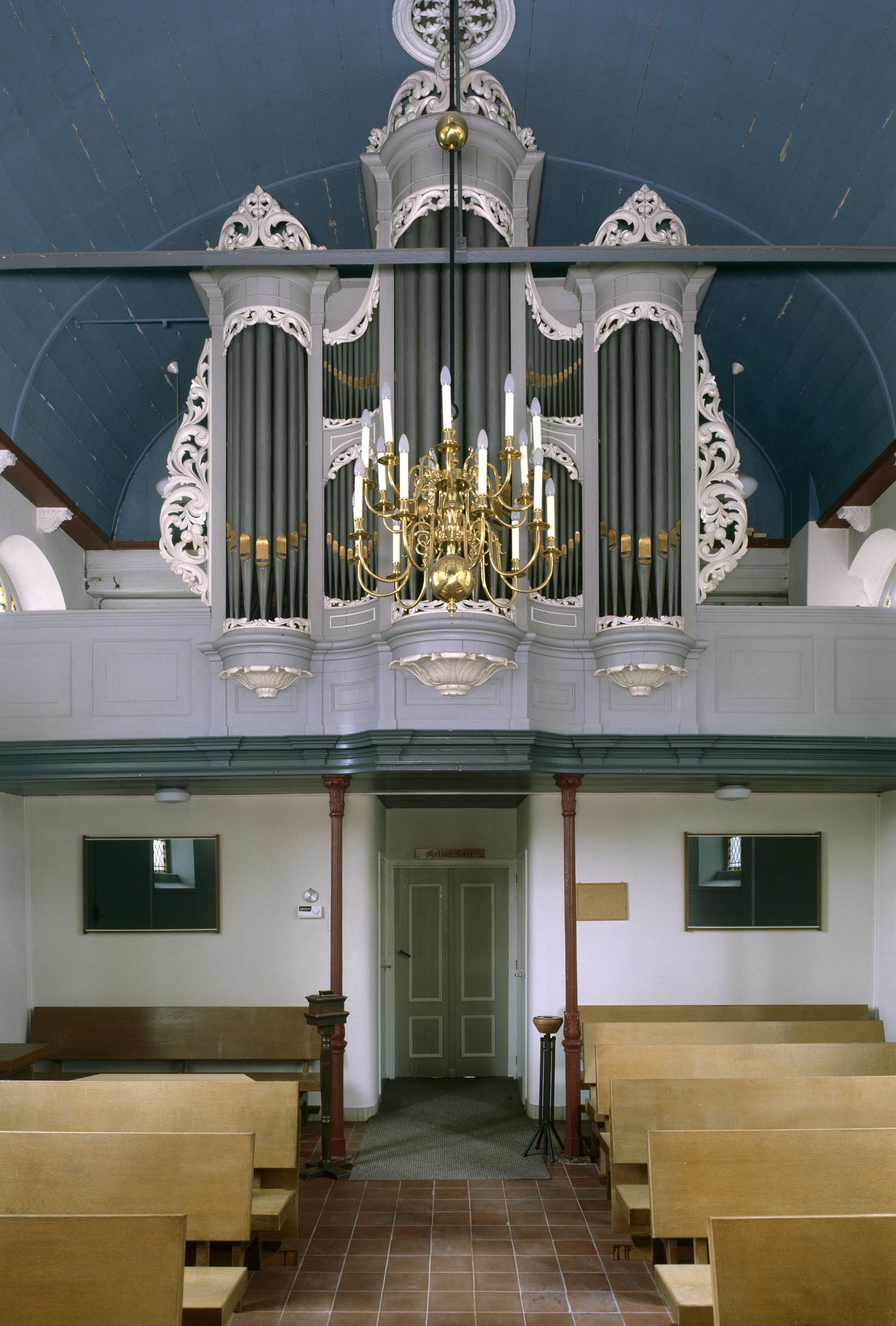 Nederlands Hervormde Kerk: Interieur, aanzicht orgel, orgelnummer 1461 (opmerking: Gefotografeerd voor Het Historische Orgel in Nederland 1886-1894, bladzijde 65)